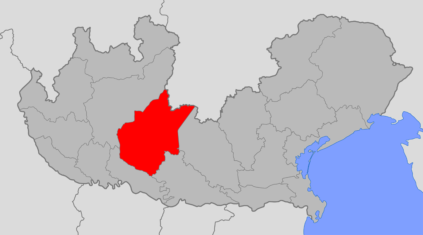 La provincia di Brescia nel Regno Lombardo-Veneto (1816-1859)